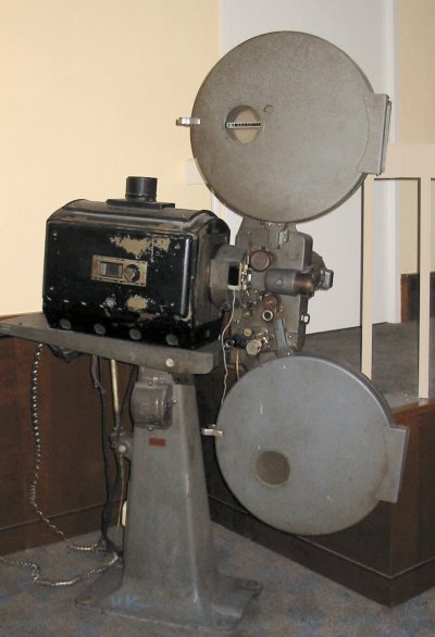 Filmprojector in bioscoop City in Utrecht, merk Philips, eigen foto ter beschikking gesteld onder GNU/FDL, juni 2004